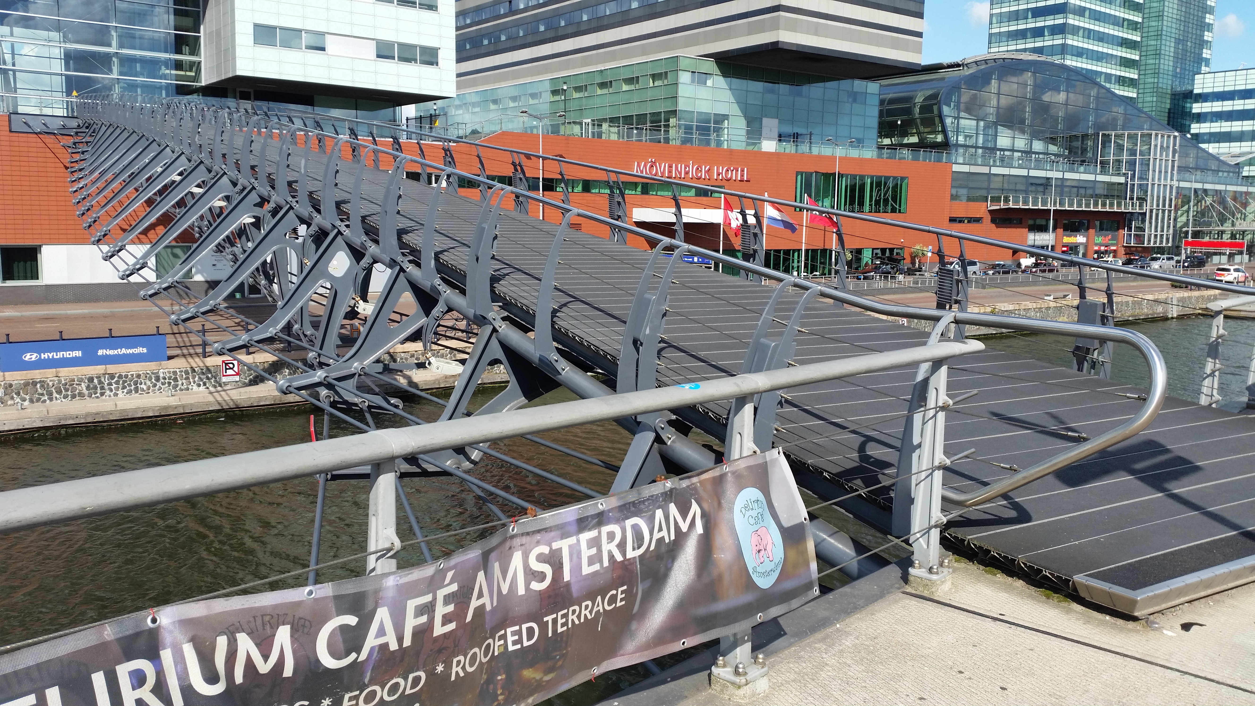 Brug 2326, Zouthavenbrug